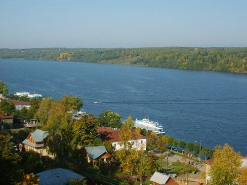 Волга в Плёсе